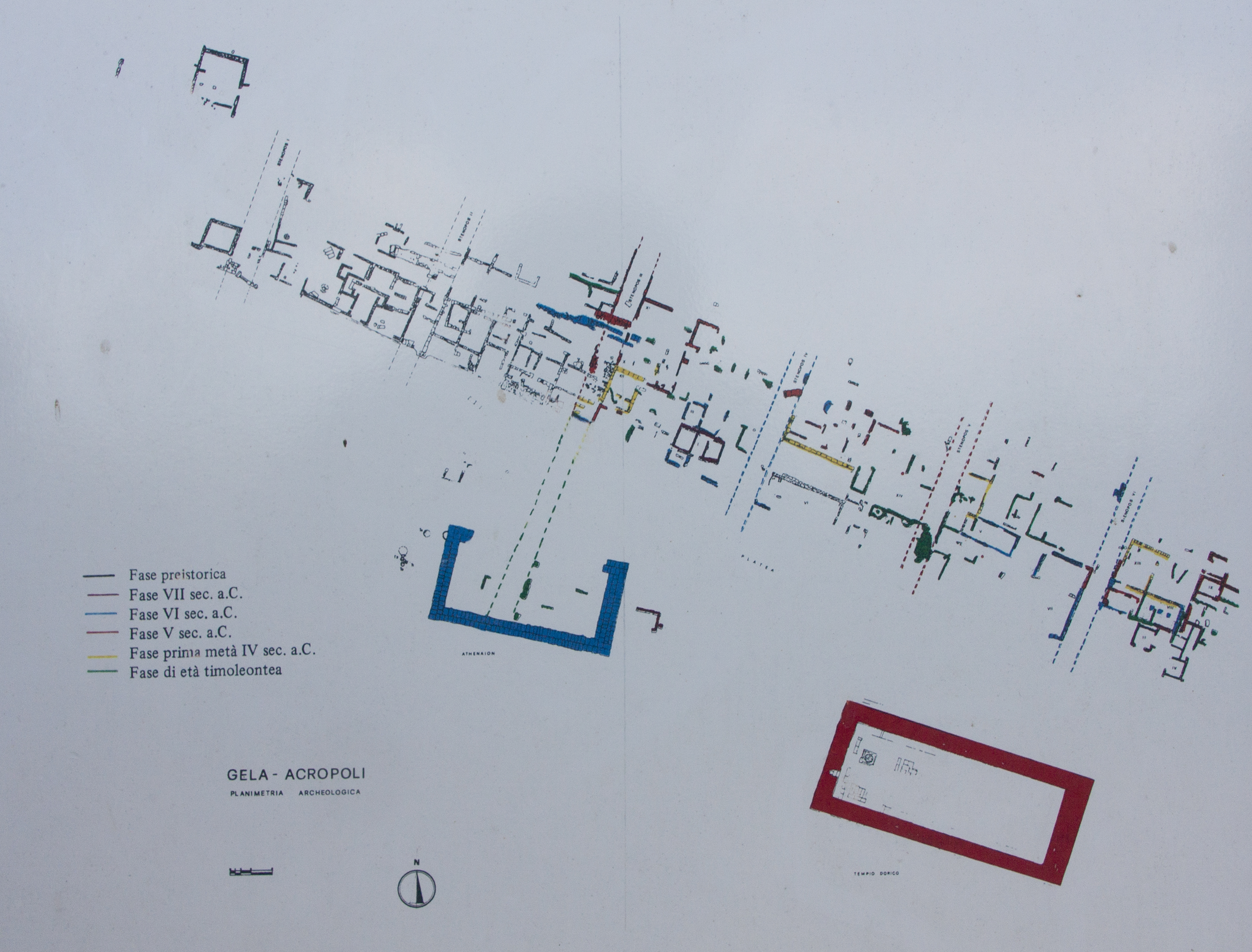 Planimetria dell'acropoli di Gela